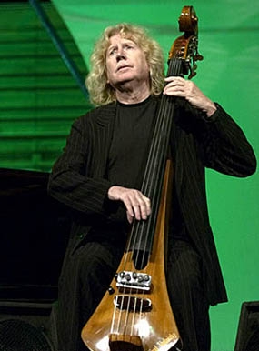 Der Jazzbassist Eberhard Weber bei einem Konzert in Luzern, Schweiz.